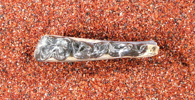 Leptotragulus profectus Matthew